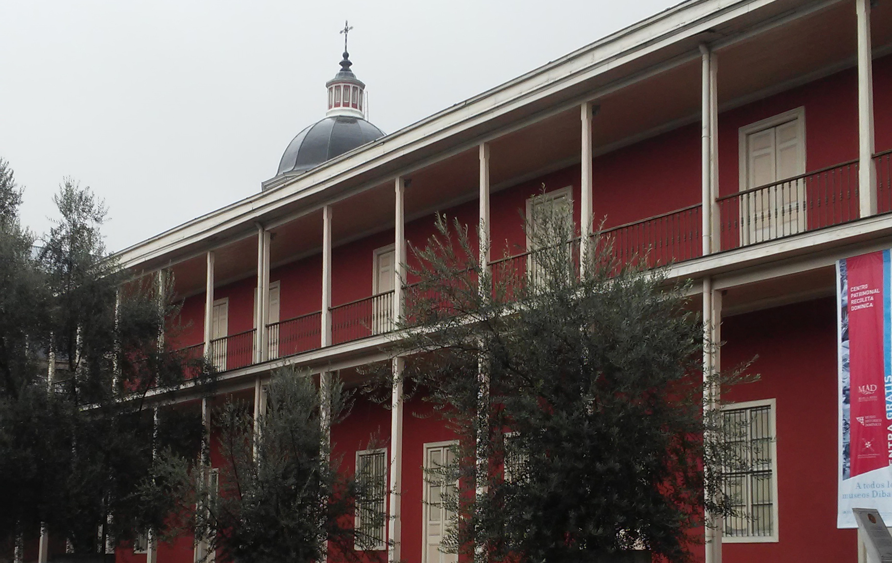 Fachada Biblioteca Patrimonial Recoleta Dominica